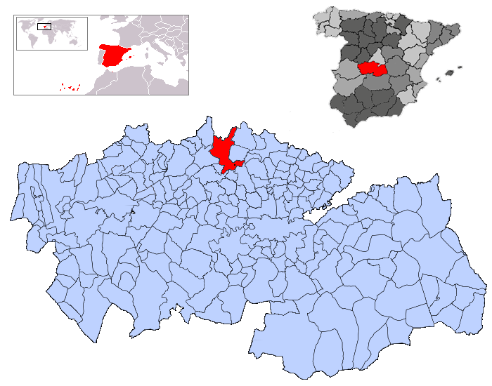 Santa Cruz del Retamar en la provincia de Toledo